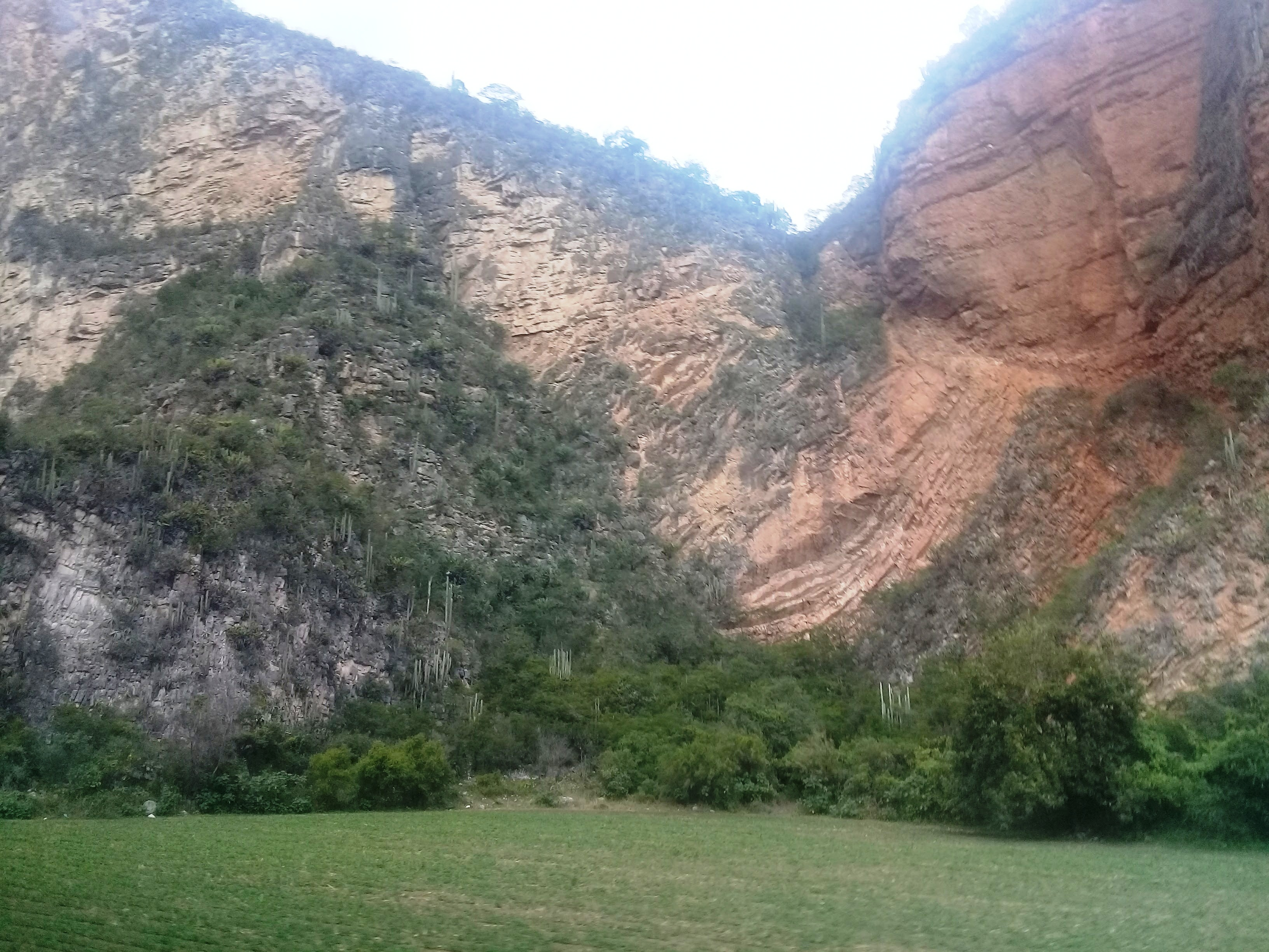 Camino a Metztitlán. 001